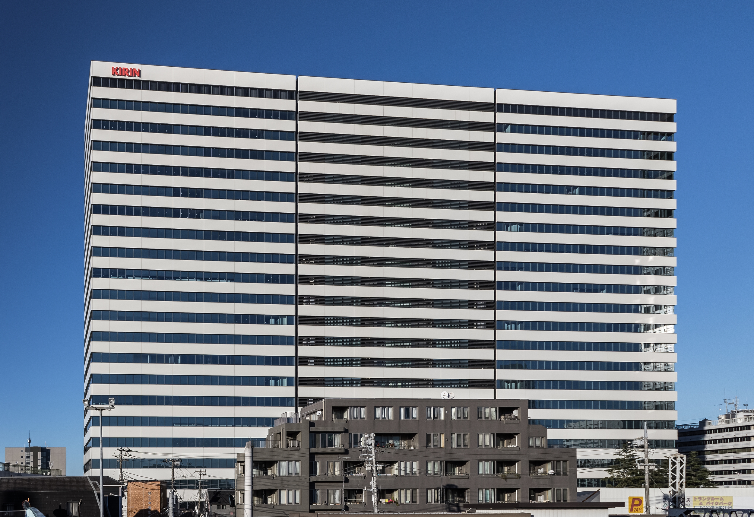 麒麟麦酒本社（中野セントラルパークサウスビル）。